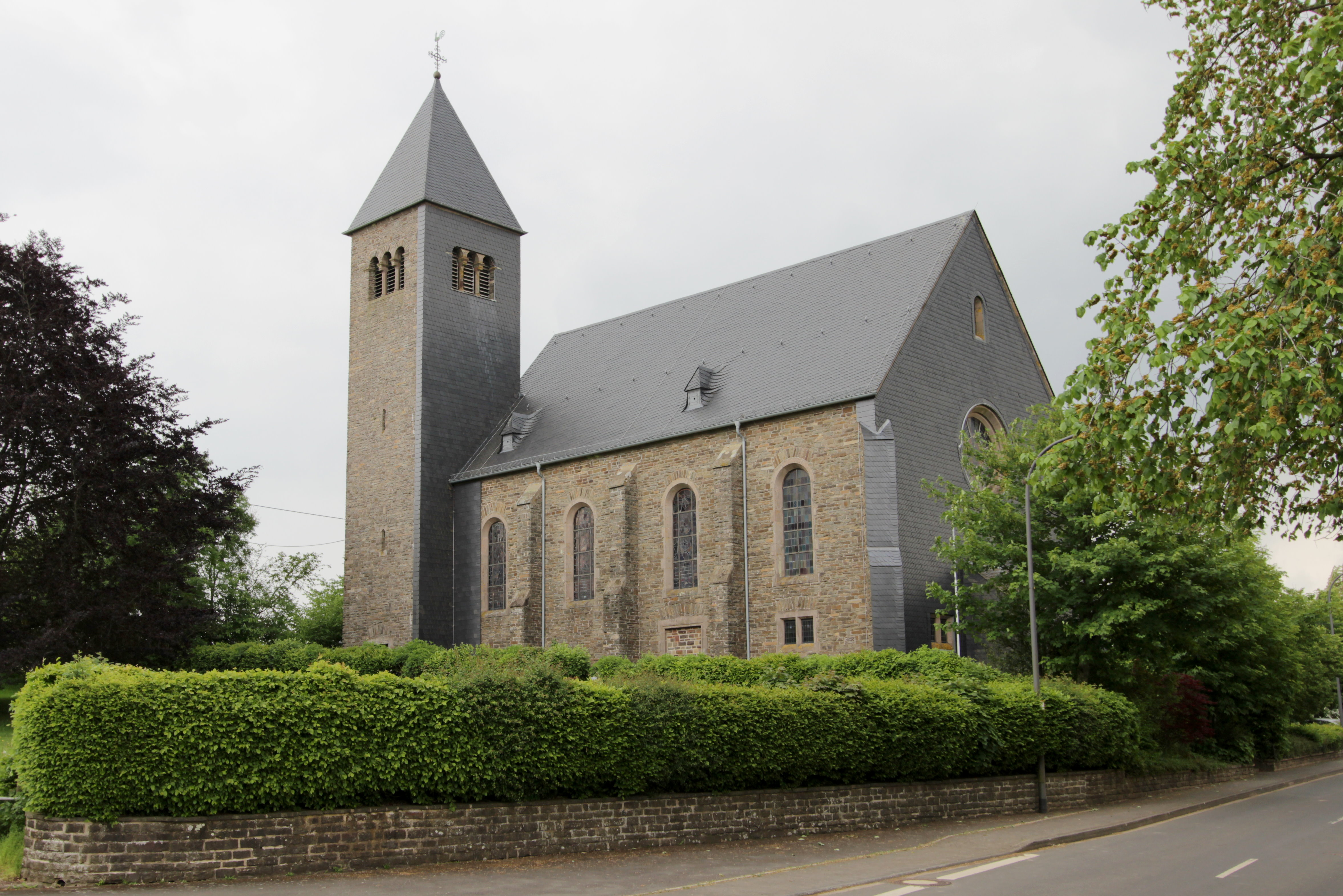 54689 Olmscheid, Hauptstraße 42a. Romanisierender Bruchstein-Saalbau, teilweise verschiefert, 1912–16, Architekt Dombaumeister Julius Wirtz, Trier; mit Ausstattung. Aufnahme von 2018.